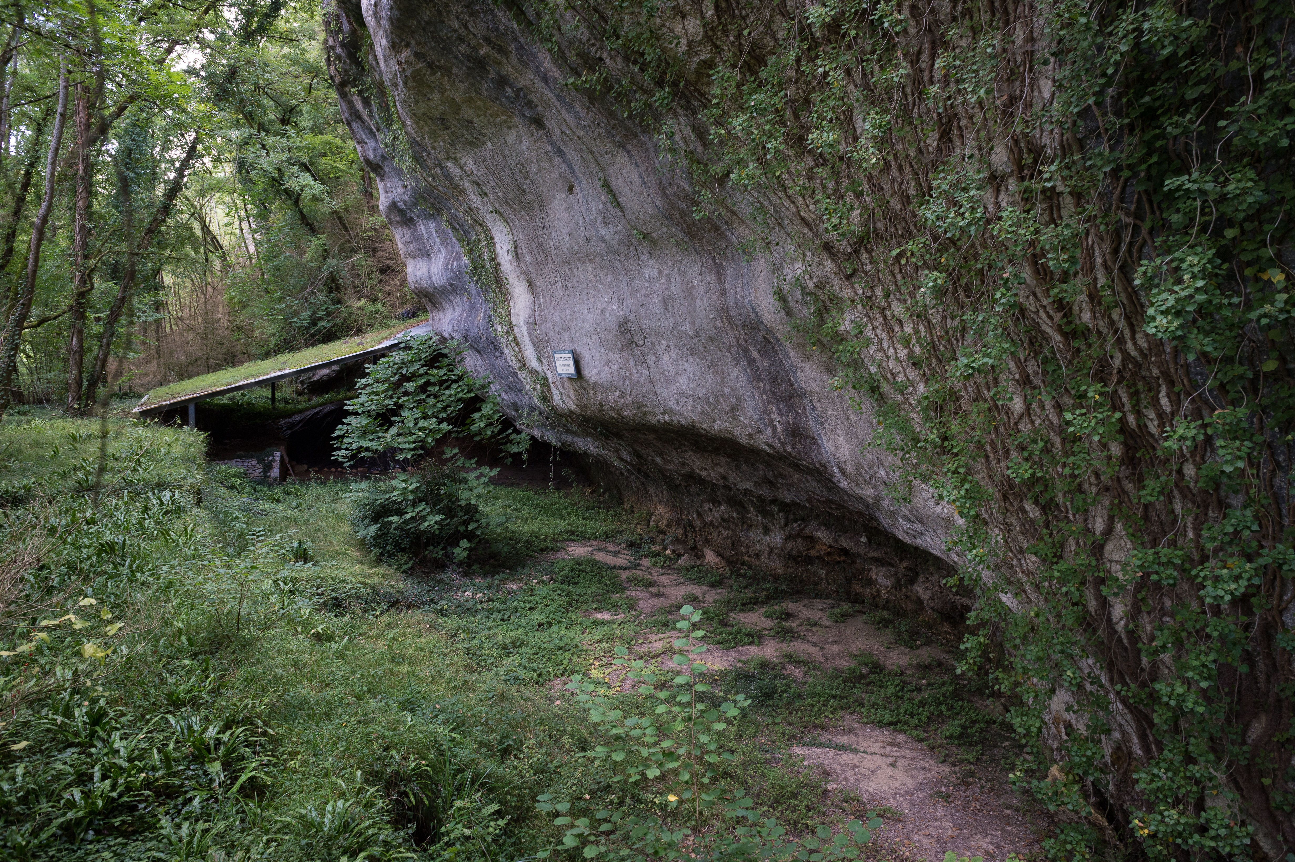 Der Abri La Madeleine an der Vézère bei Tursac in Frankreich.